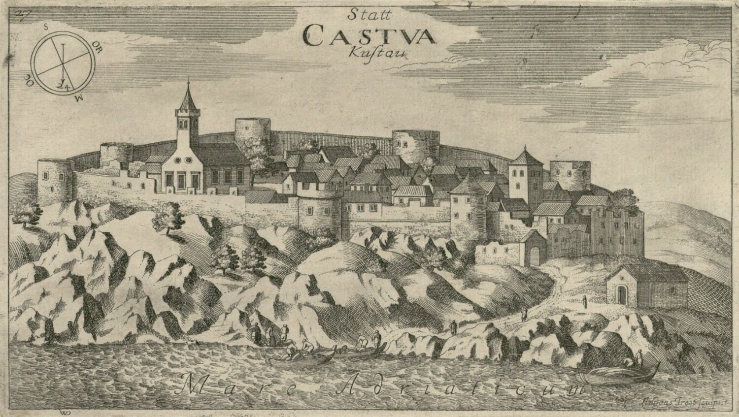 Kastav